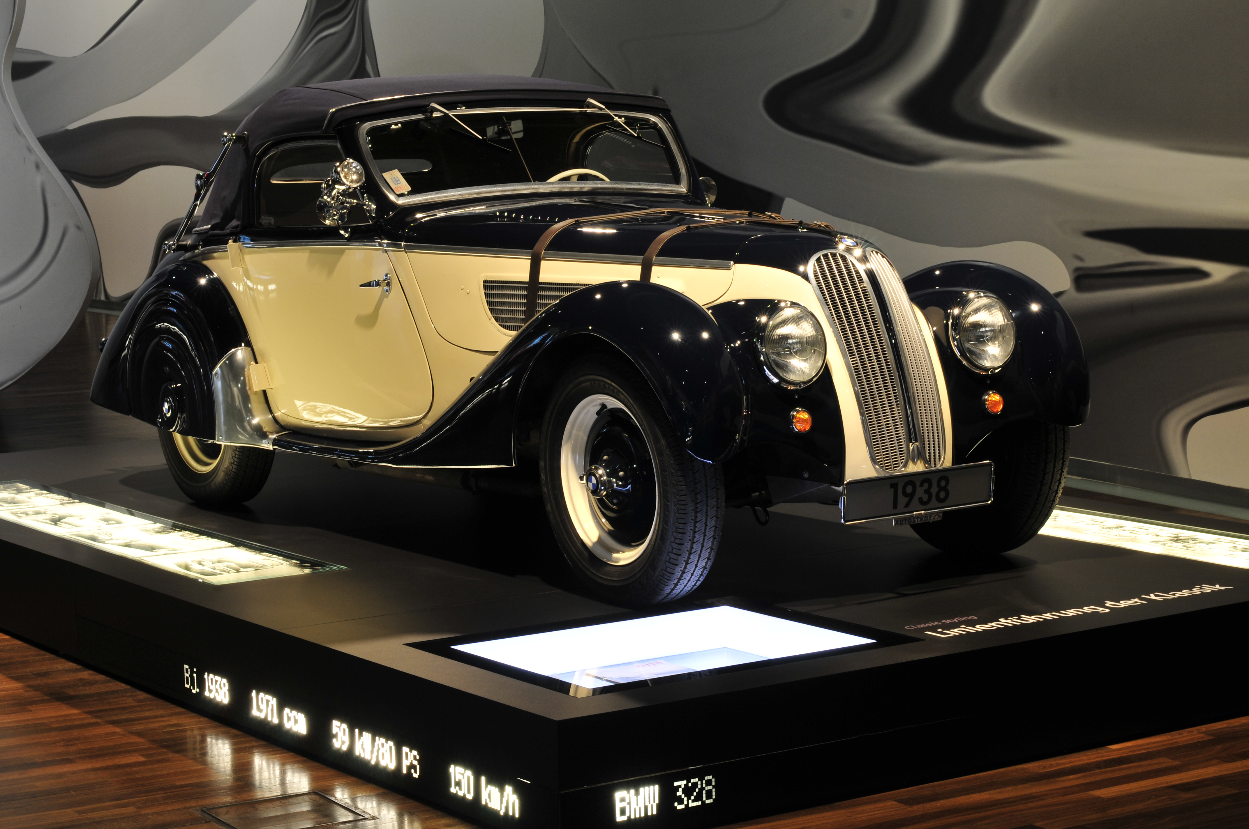 Autostadt Wolfsburg; Auto im Zeithaus: BMW 328